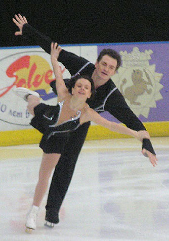 Maria Petrowa & Alexei Tichonow (Russische Meisterschaften 2005)